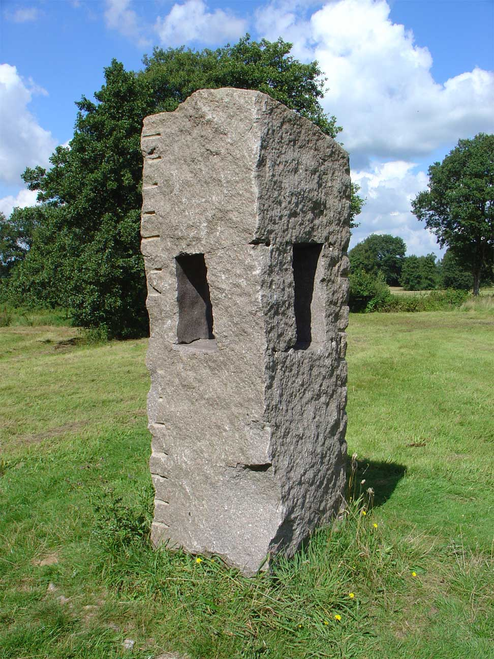 "Monument voor Harry de Vroome" door Bastiaan de Groot - fietspad langs het Balloërveld